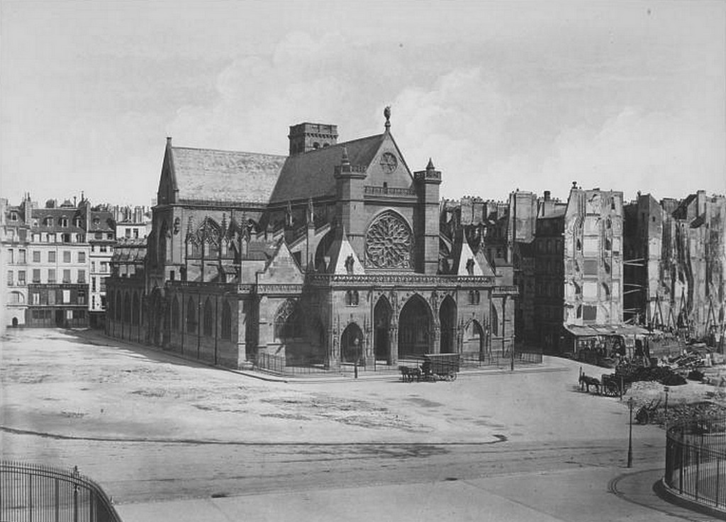 Eglise Saint-Germain-l'Auxerrois avant la construction de la mairie du Ier arrondissement, du beffroi de celle-ci et de la place du Louvre.